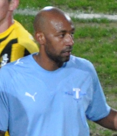 Jeffrey Aubynn